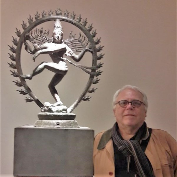 Juan Carlos Mondragón en el museo Guimet con la estatua de Shiva Natarâdja